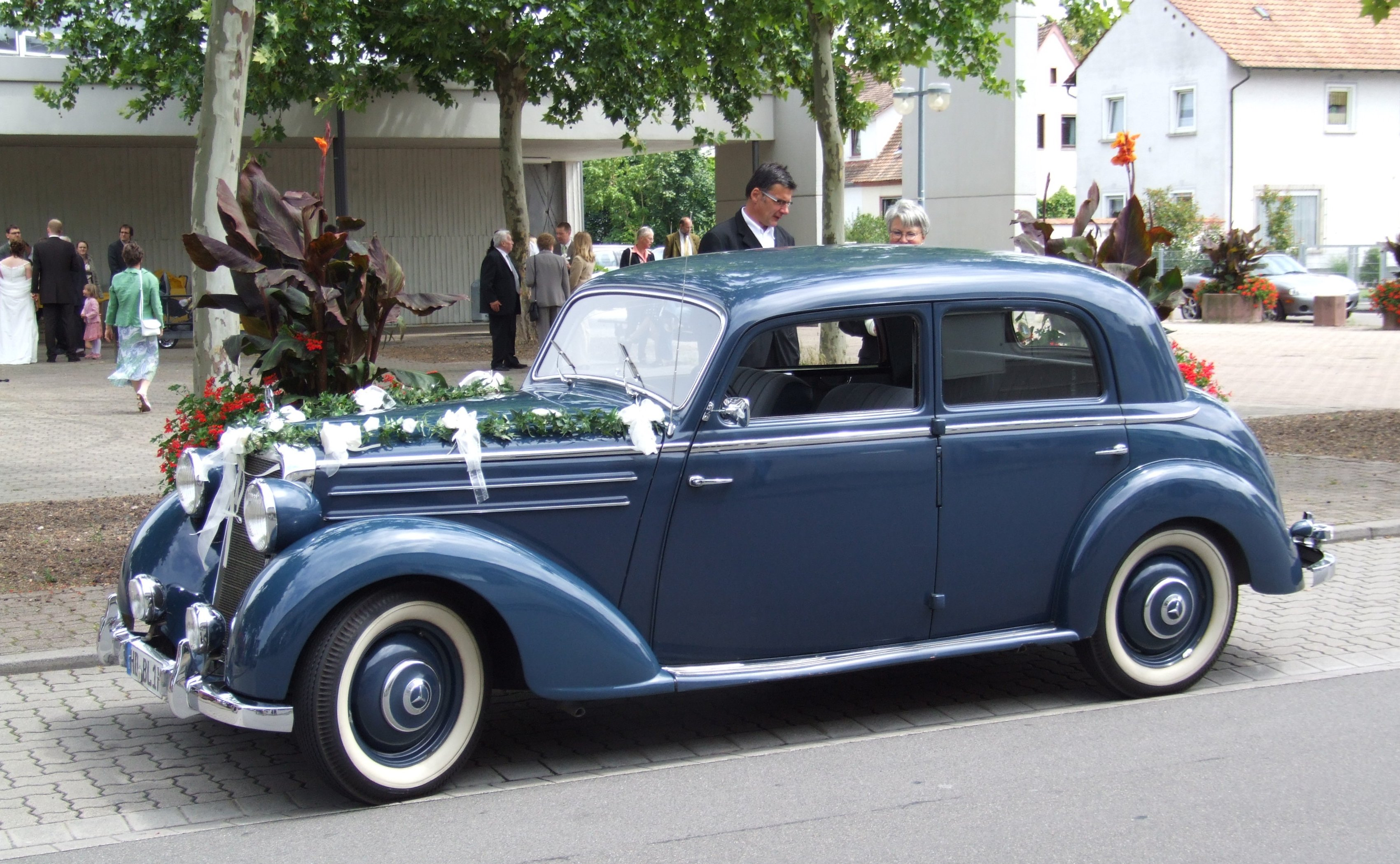 Mercedes 170 DS, Baujahr 1953 als Hochzeitswagen im 30. Juni 2007